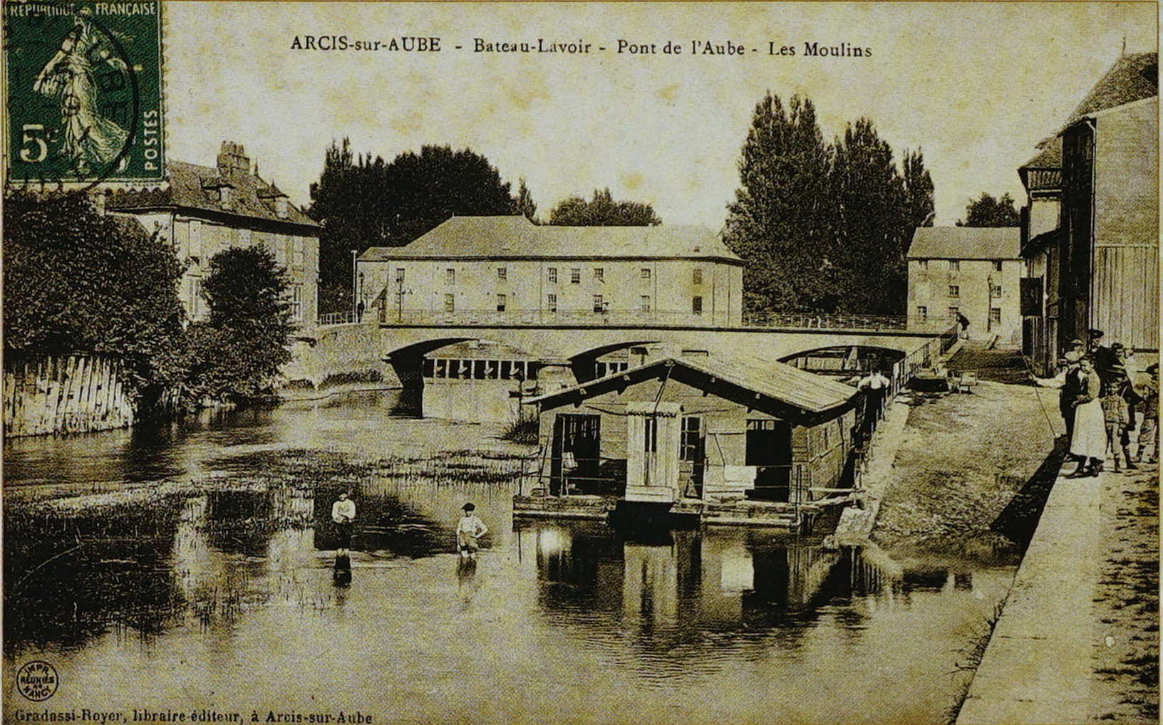 vue d'arcis.